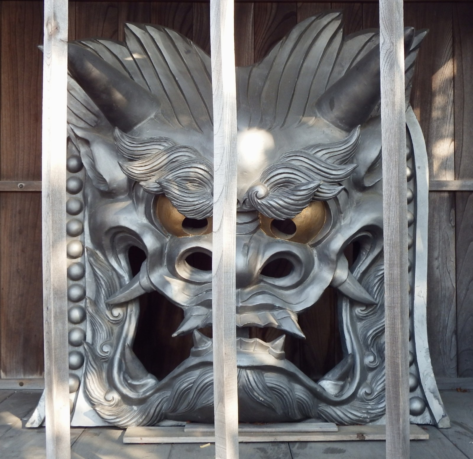 遍照院の仁王瓦（右）